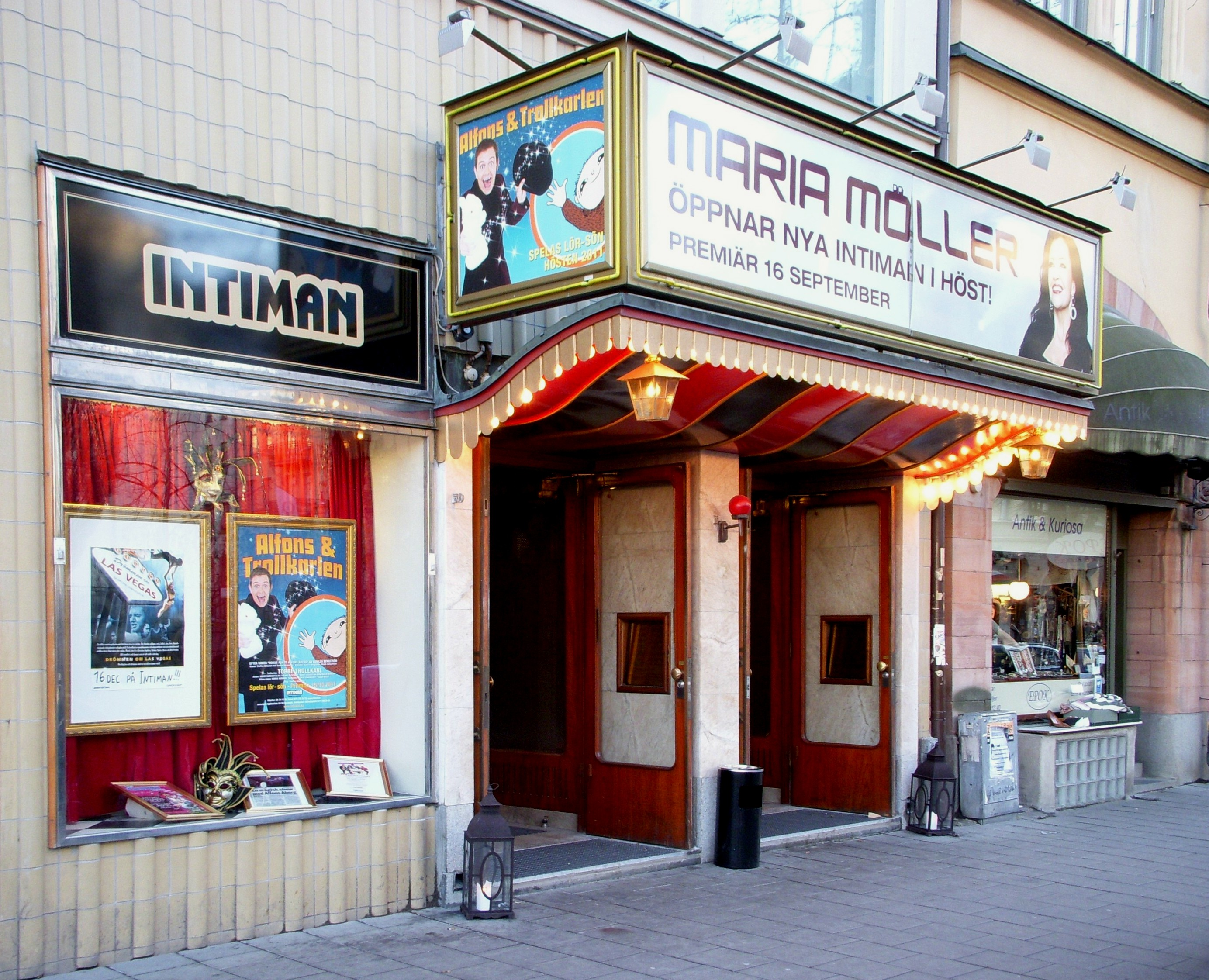 Intiman Odenplan